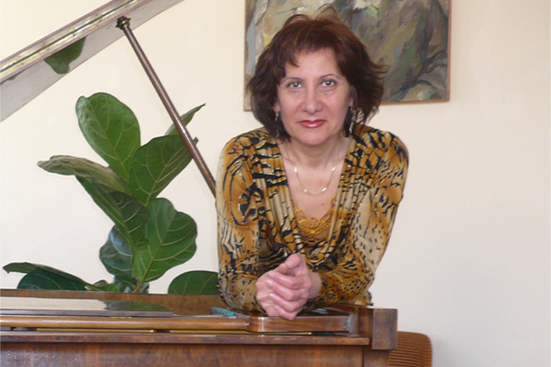 Портрет на Лиляна Гетова - Райкова, български пианист